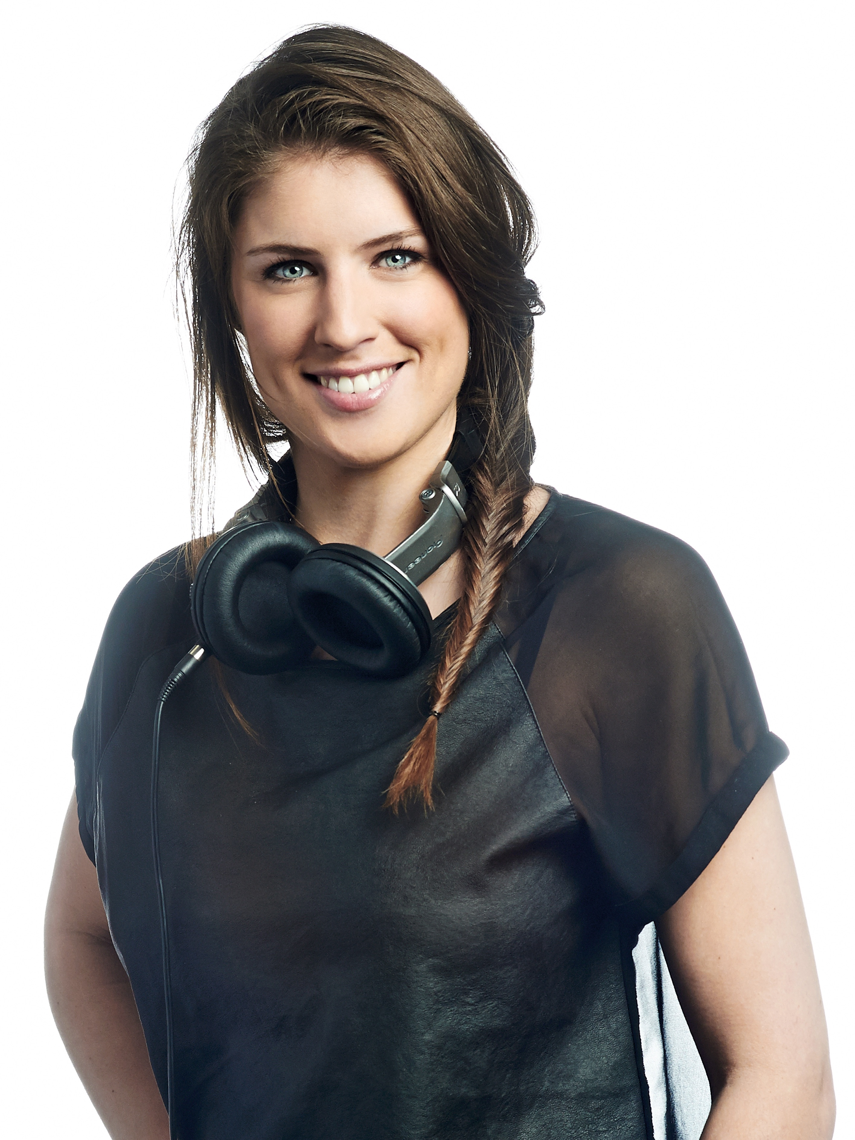 Q-music dj Marieke Elsinga